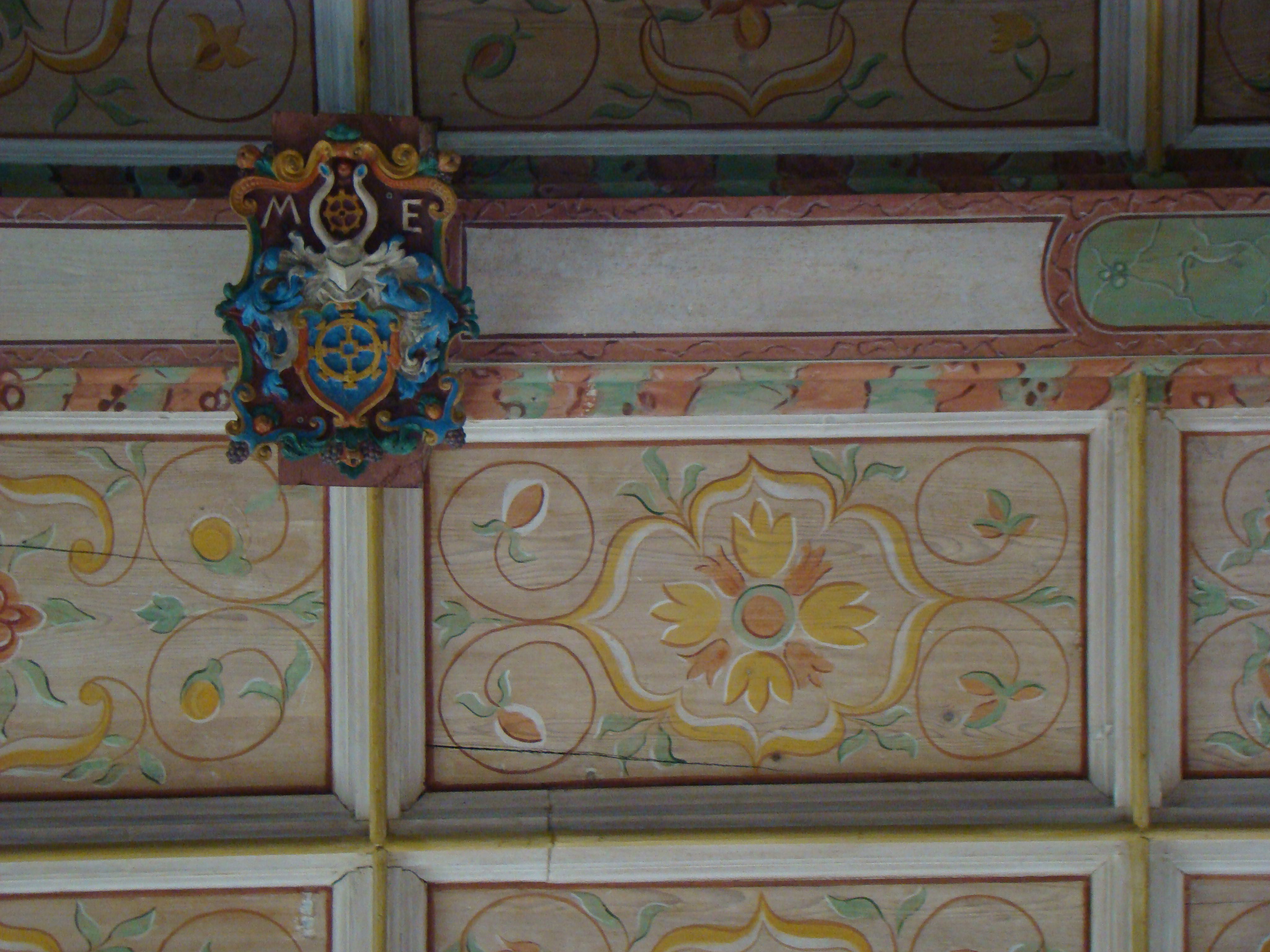 Bemalte Holzdecke in der Kilianskirche in Obersulm-Sülzbach